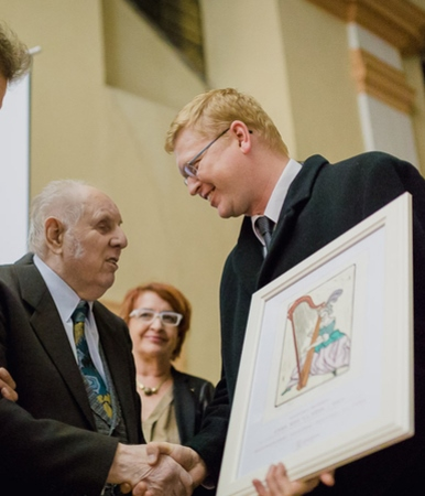 Vlastimil Železník přebírá Cenu MHF F.L.Věka 2014